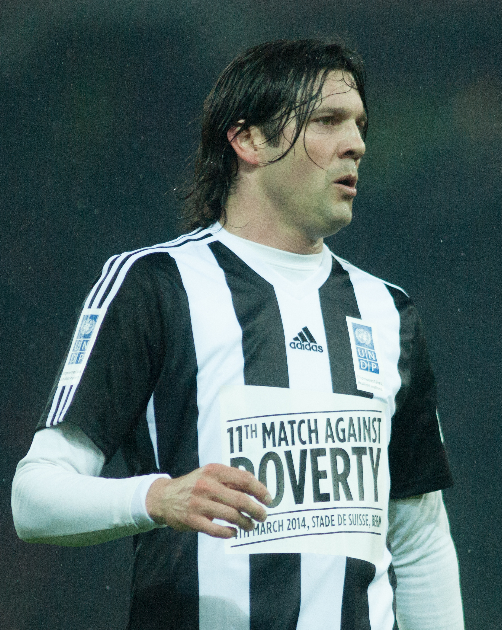 Football against poverty 2014 - Santiago Solari